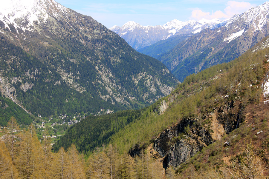 Panorama della Valle Anzasca dal ghiacciaio del Belvedere, Macugnaga